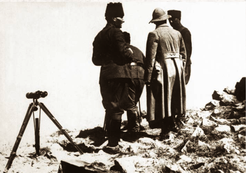 Kocatepe, Afyonkarahisar, 26 Ağustos 1922